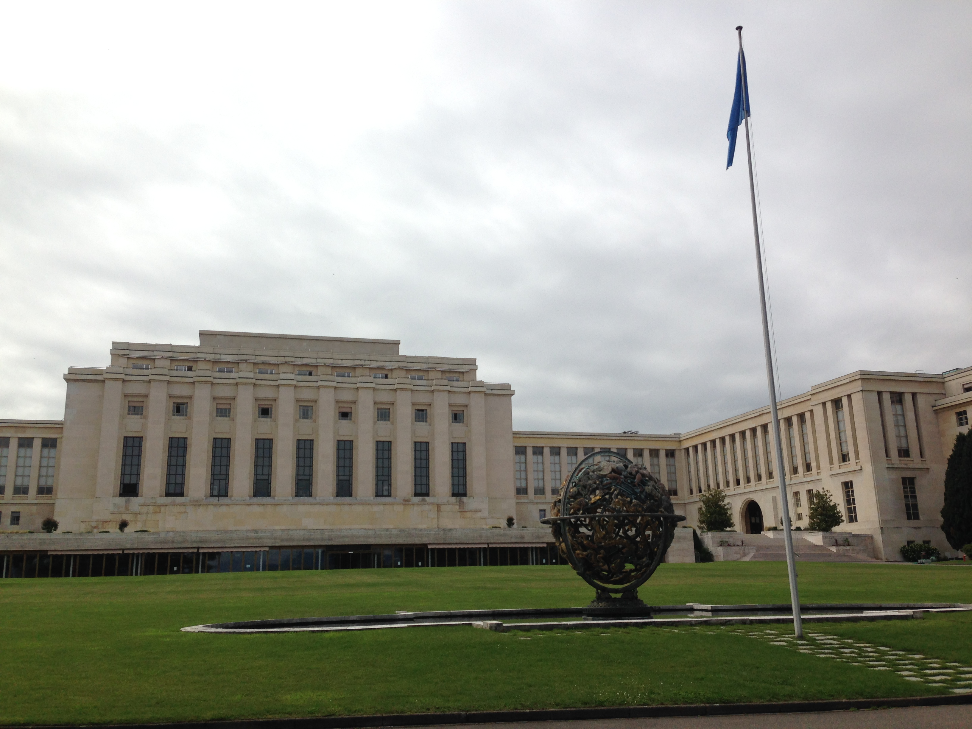 Ansicht Seeseite